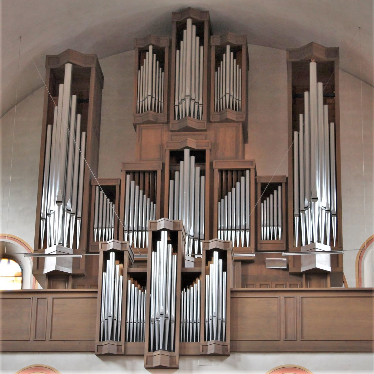 Orgel von St. Anton in München (1977, WRK-Orgelbau, III/44)